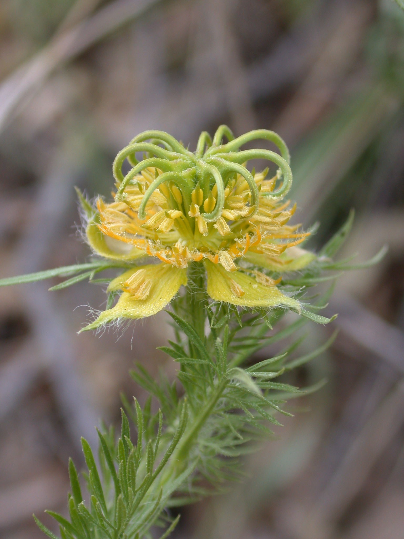 Nigella ciliaris DC. (קצח ריסני), Mount Carmel, Israel, March 29, 2008.